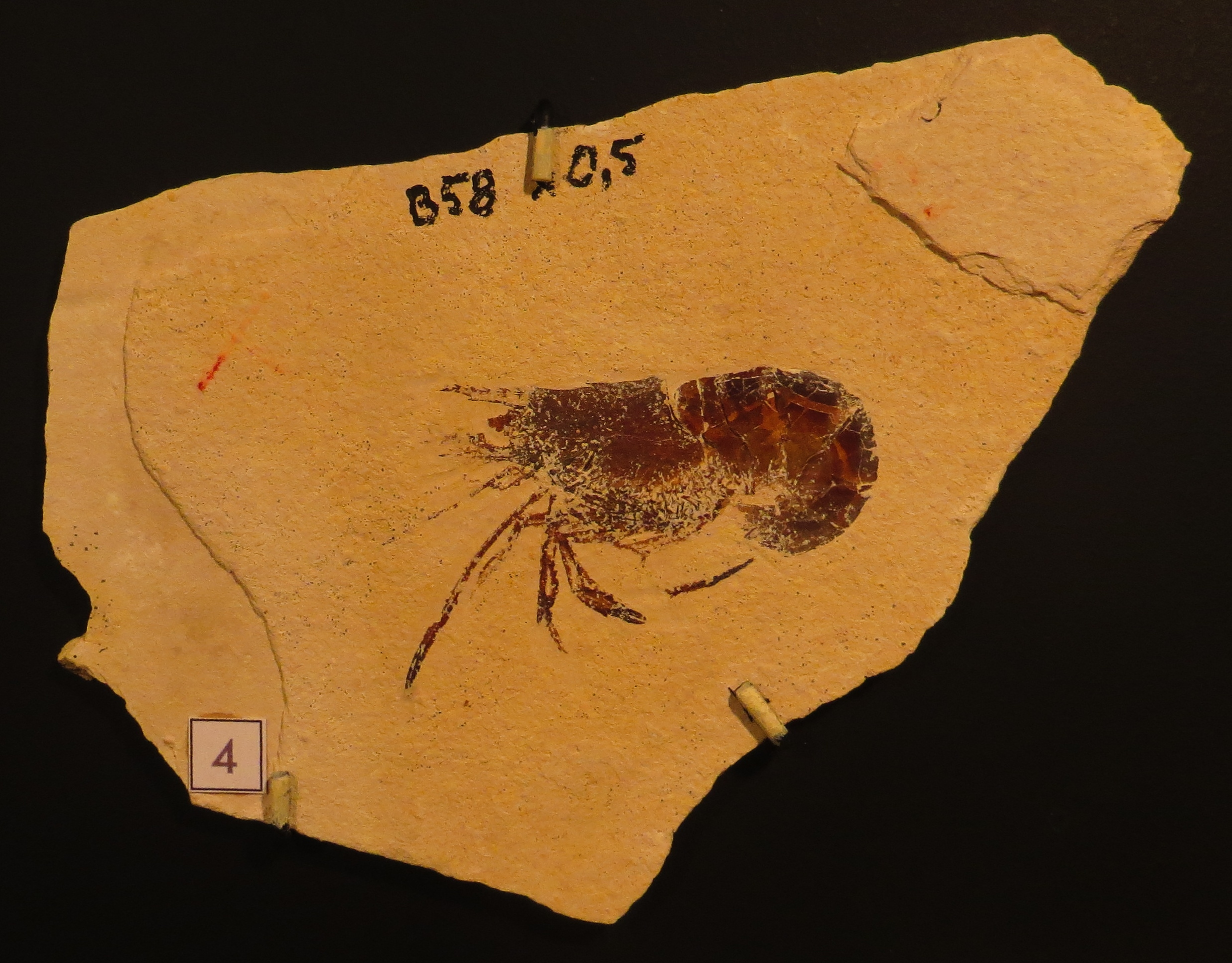 Took the picture at Natural History Museum in Bamberg